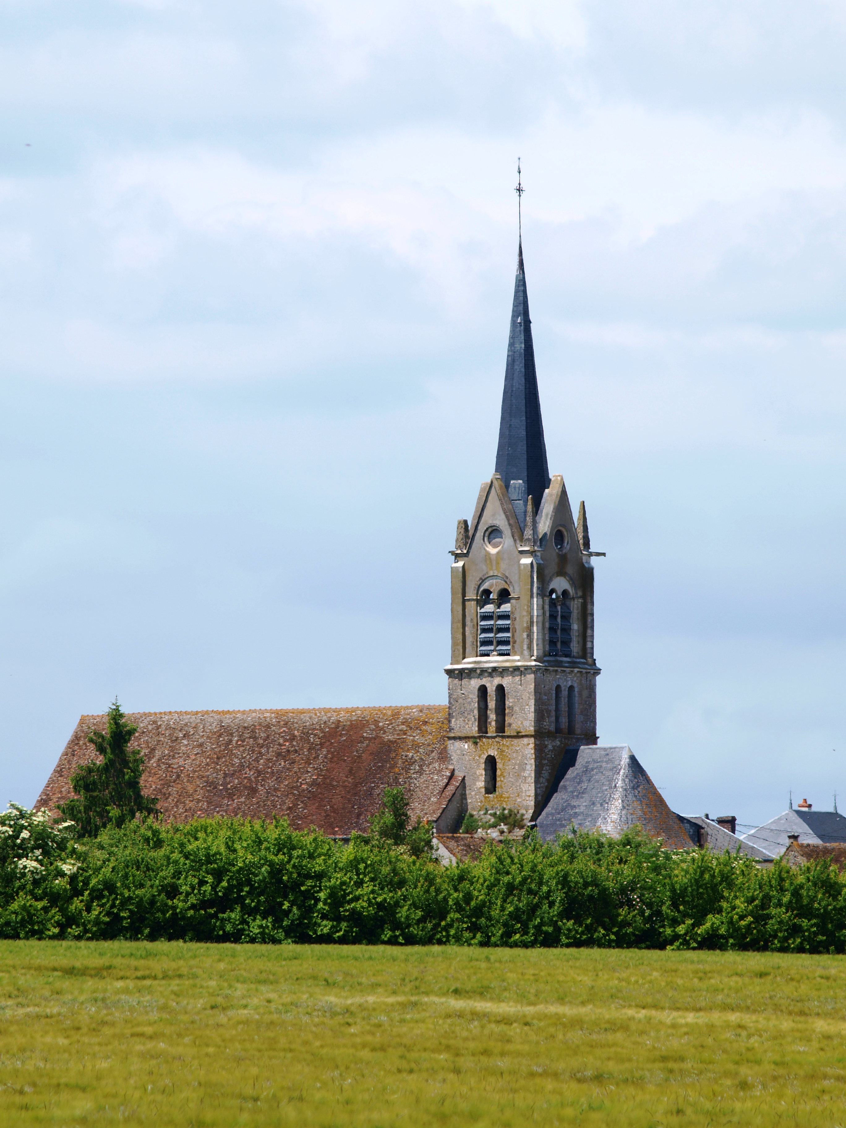 Girolles (Loiret, France)